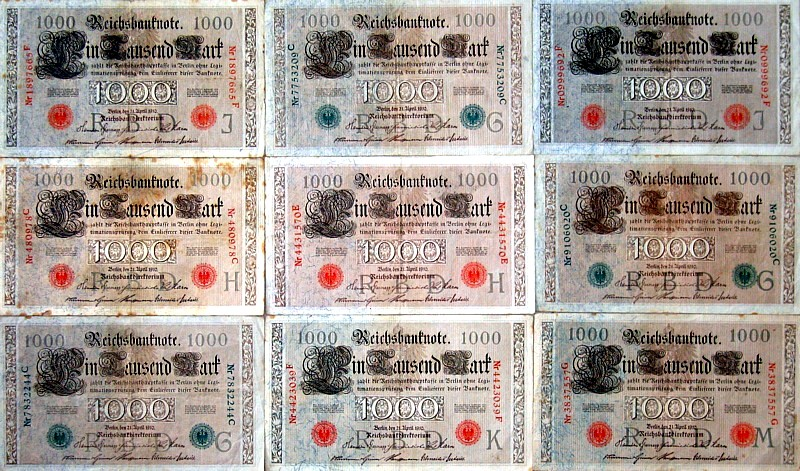 Banknoten - 1000 Mark - Deutsches Reich - 21.04.1910